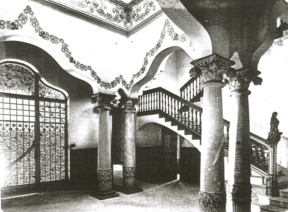 Interior de la casa Trinxet aun sin muebles antes de entrar a vivir en 1904